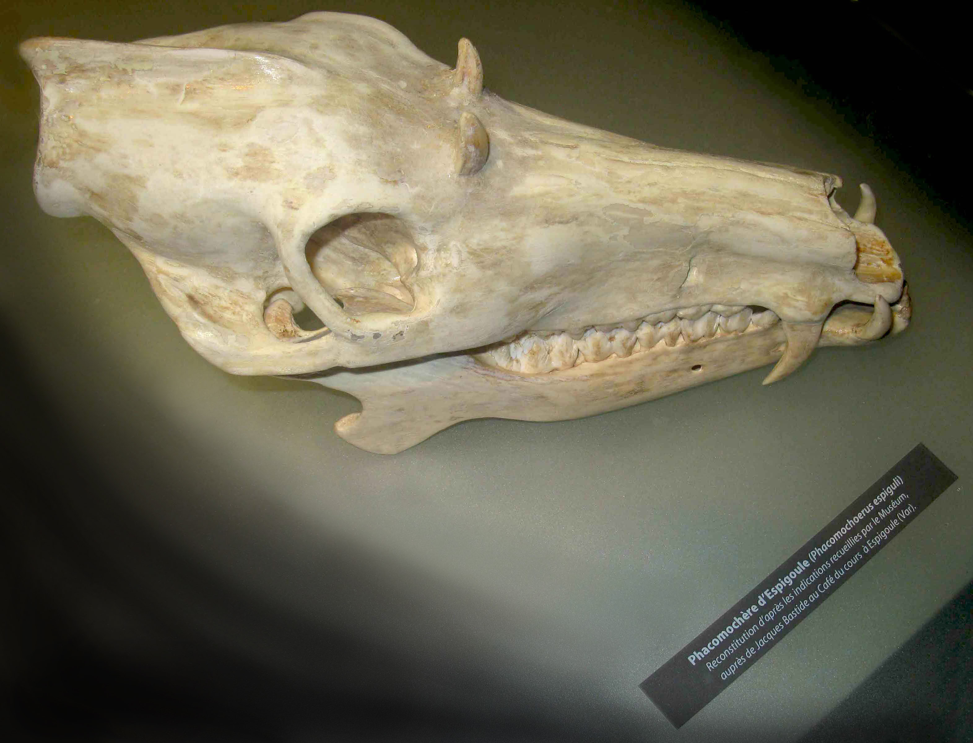 Sculpture représentant un crâne de Phacomochère d'Espigoule mâle, animal de fiction